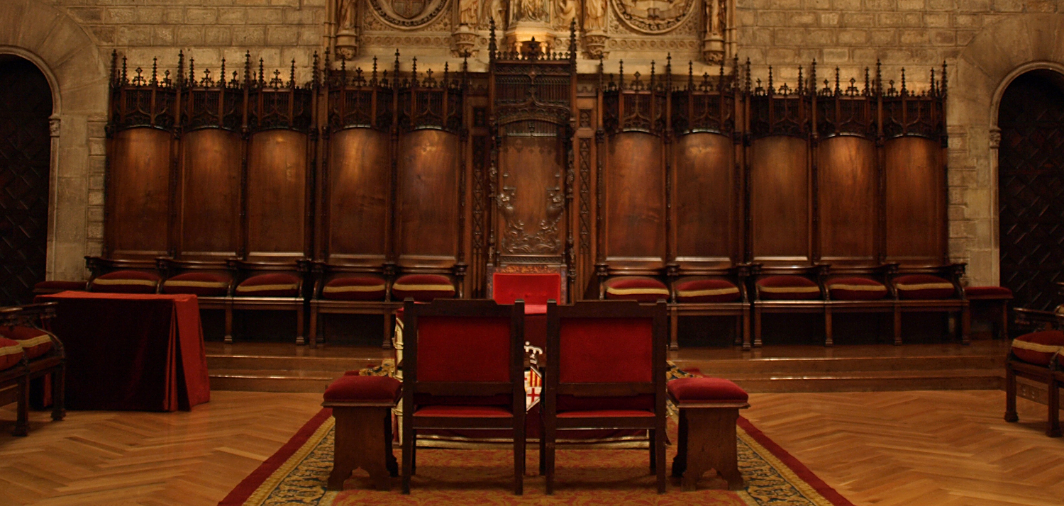 Saló de Cent (Ajuntament de Barcelona)